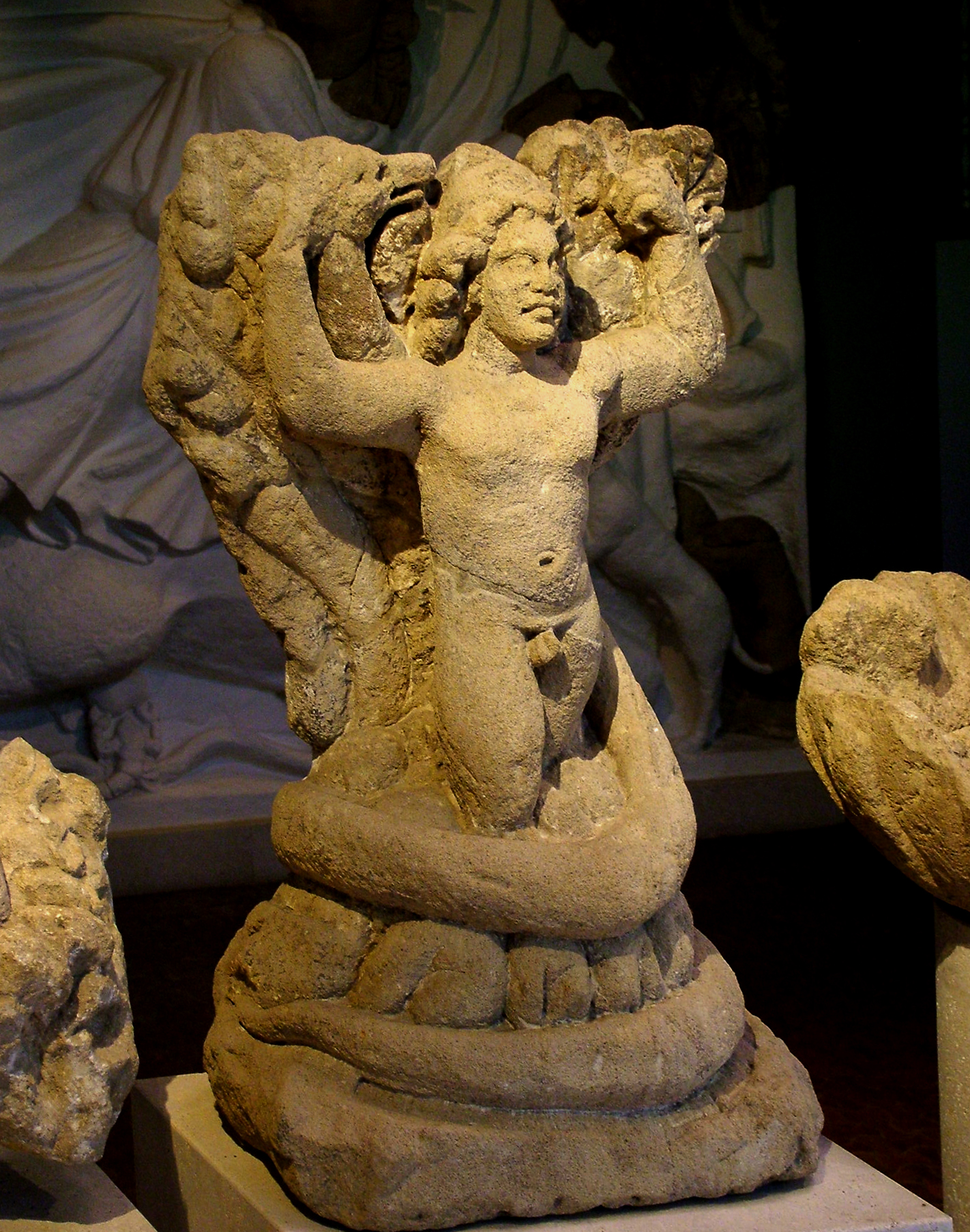 A lombok közt születő Mithrász (Carnuntinum Múzeum, Bad Deutsch Altenburg, Ausztria)